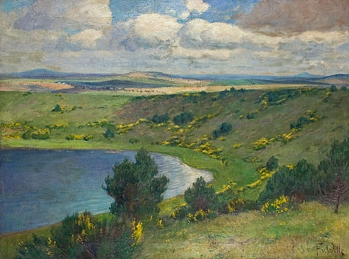 Windsborner Maar bei Bettenfeld. Öl auf Leinwand, 62,5 x 80 cm